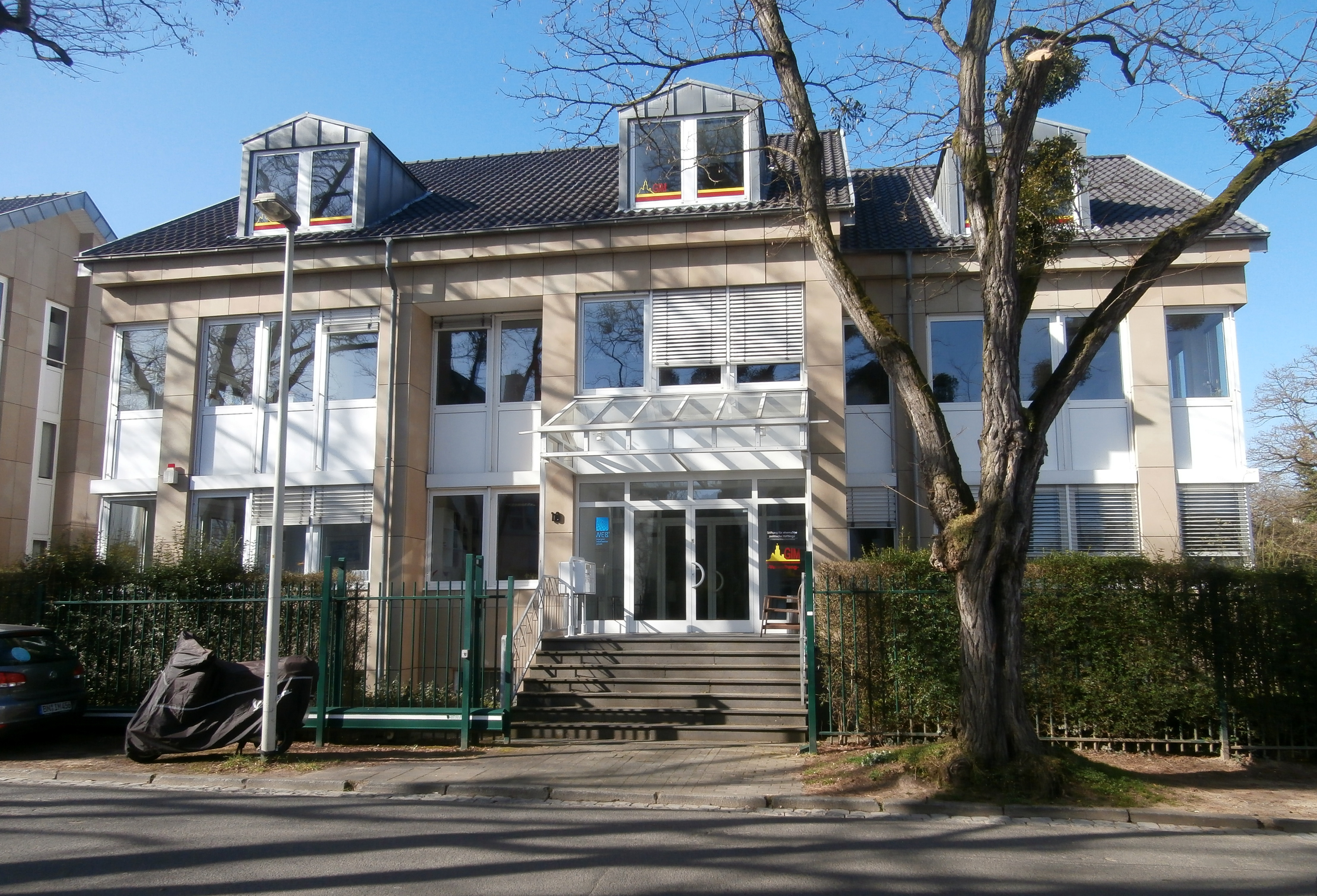 Stiftung für ehemalige politische Häftlinge, An der Marienkapelle 10, Rüngsdorf, Bad Godesberg